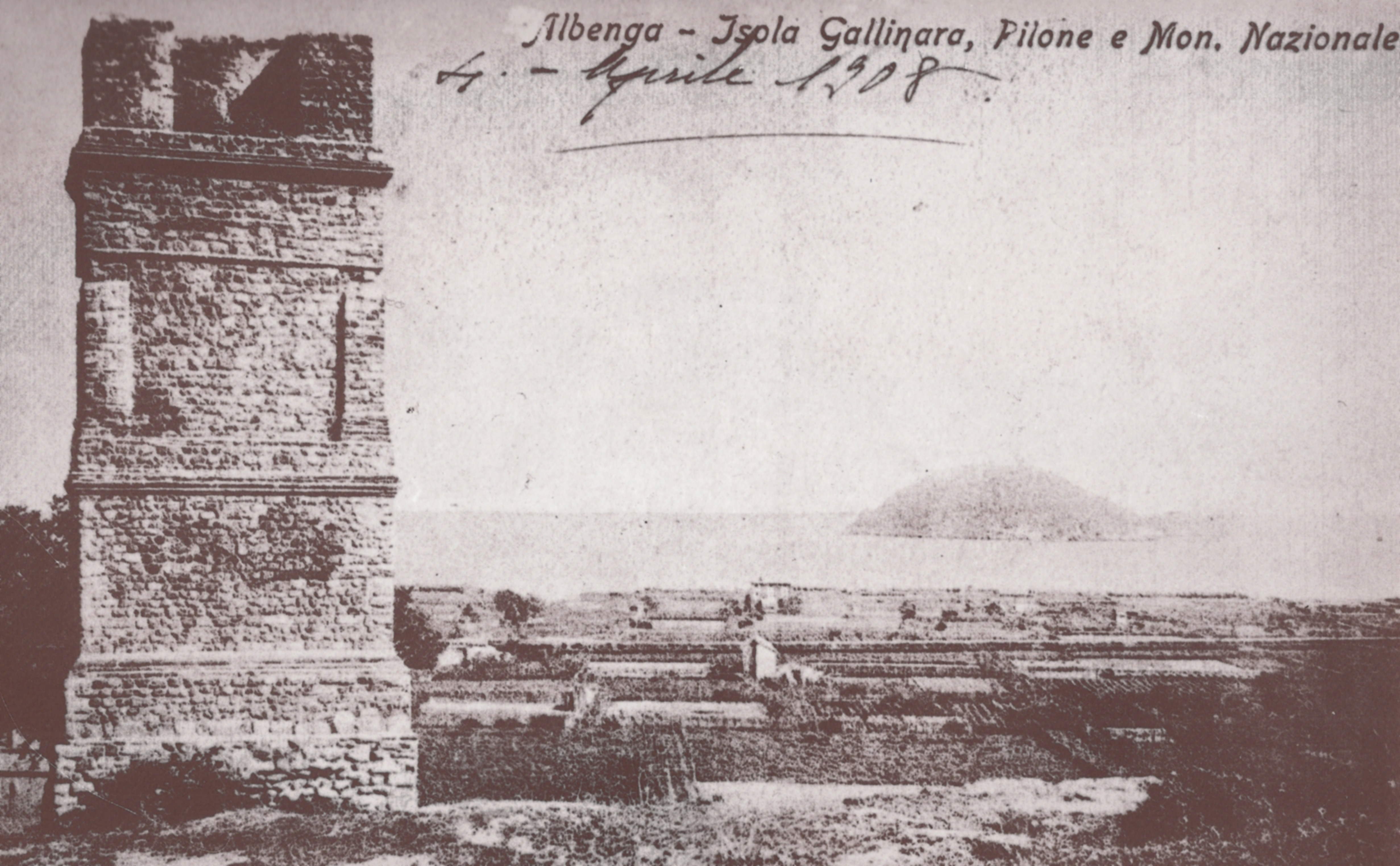 Pilone ed Isola Gallinara con vista di Vadino